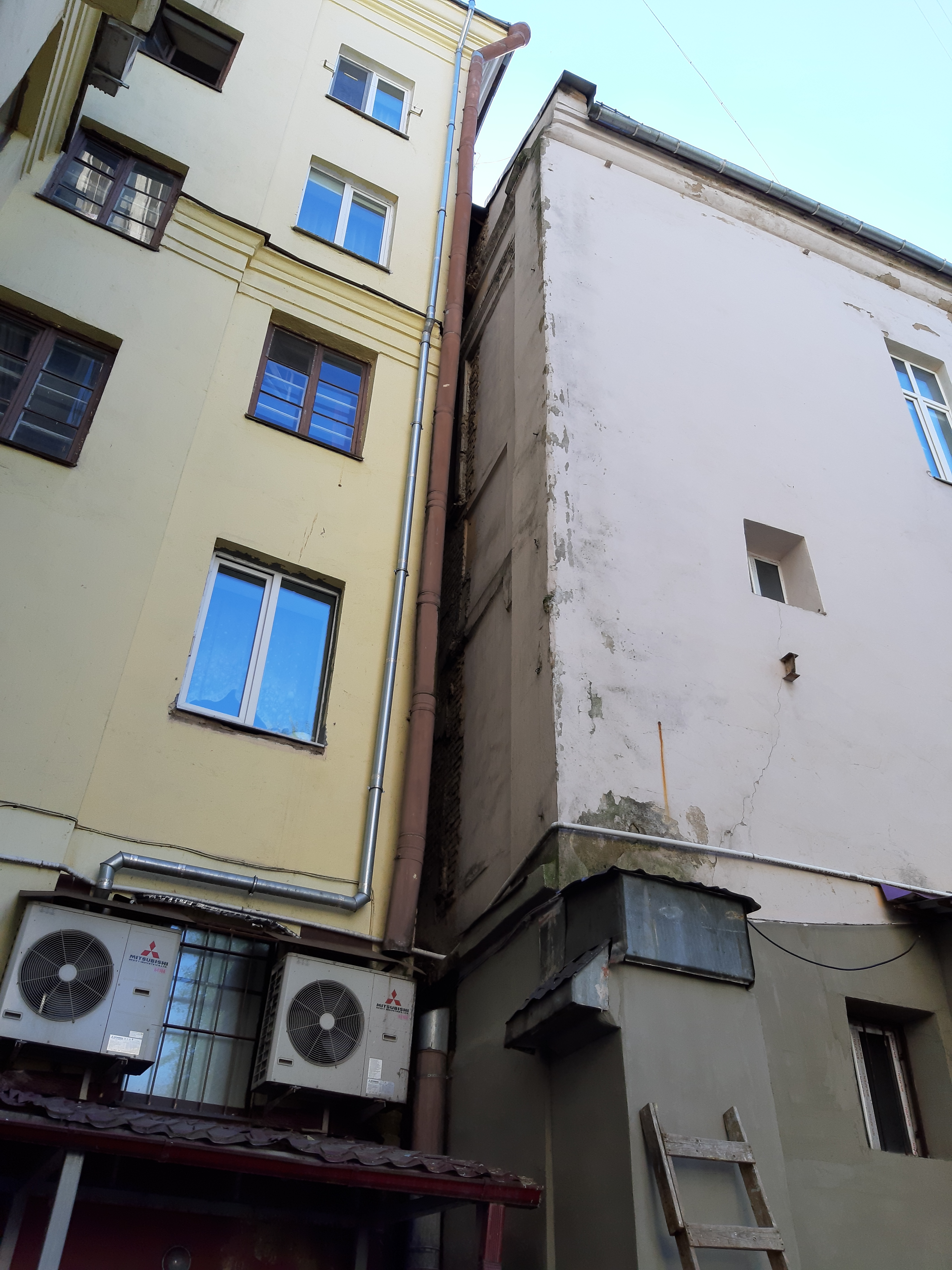 Мінск. Квартал між Гарадскім Валам і Валадарскага